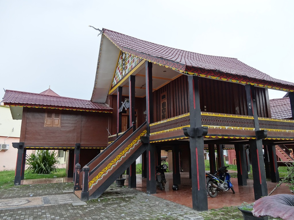 Aceh Tenggara